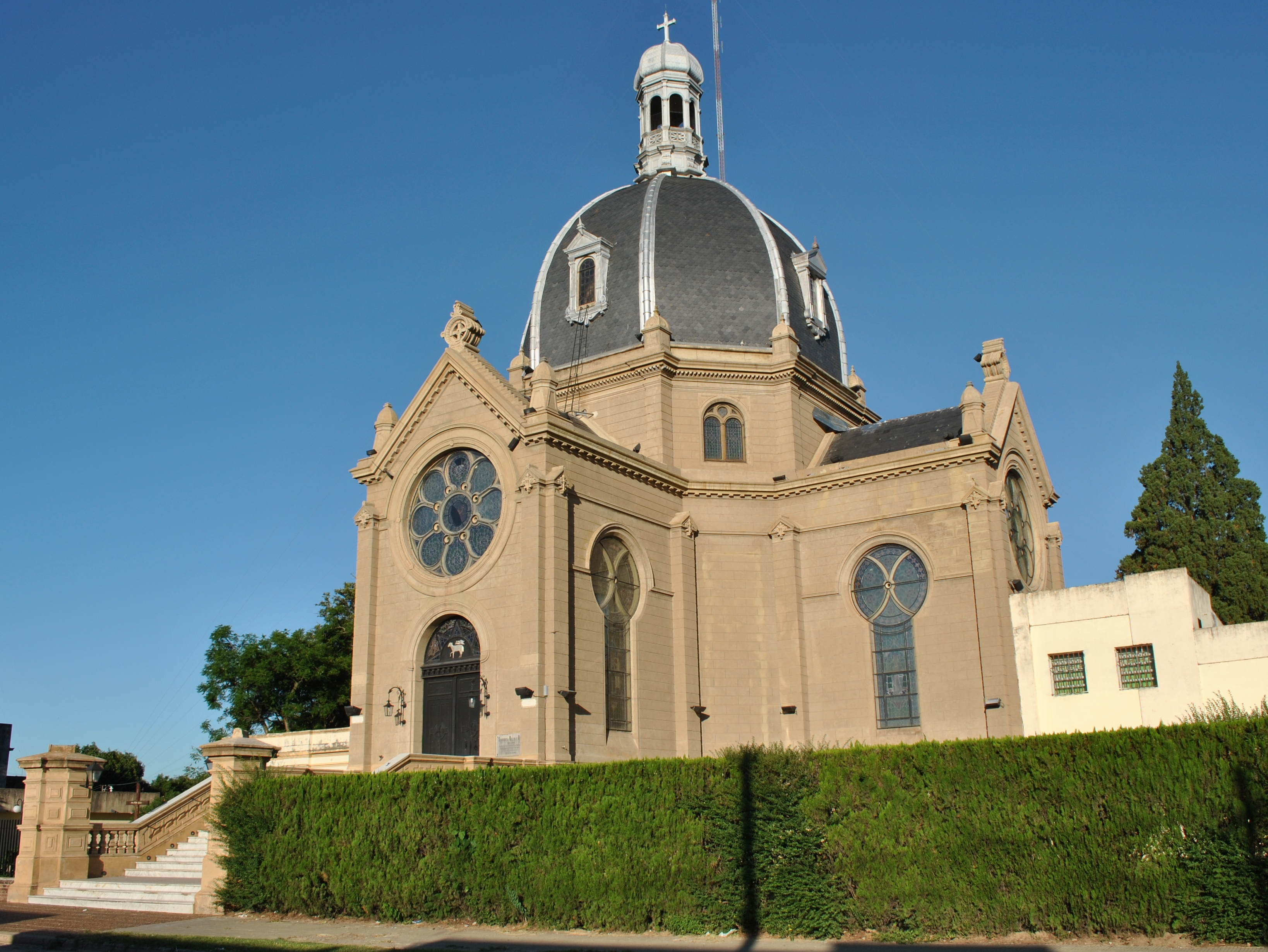 Iglesia dedicada a la advocación de San Roque y San Jacinto, fue construida a partir de 1900 por resolución testamentaria de la benefactora Sinforosa Rolón y Rubio, sobresaliente dama de la sociedad goyana (1814-1896), quien dedicó su vida a la caridad y a atender las necesidades de su comunidad como expiación de la muerte de su prometido en la Batalla de Pago Largo. La dirección de dicha construcción le fue confiada al ingeniero Pedro Coni (1856-1935), un distinguido profesional. Para el profesor Marcelo Daniel Fernández de la Junta de Historia de la ciudad el citado templo constituye una de las expresiones arquitectónicas de mayor relieve en su tipo que se encuentran en la provincia, en la que se amalgamaron inteligentemente varios estilos que se sucedieron en la historia del arte universal desde antes del Renacimiento.